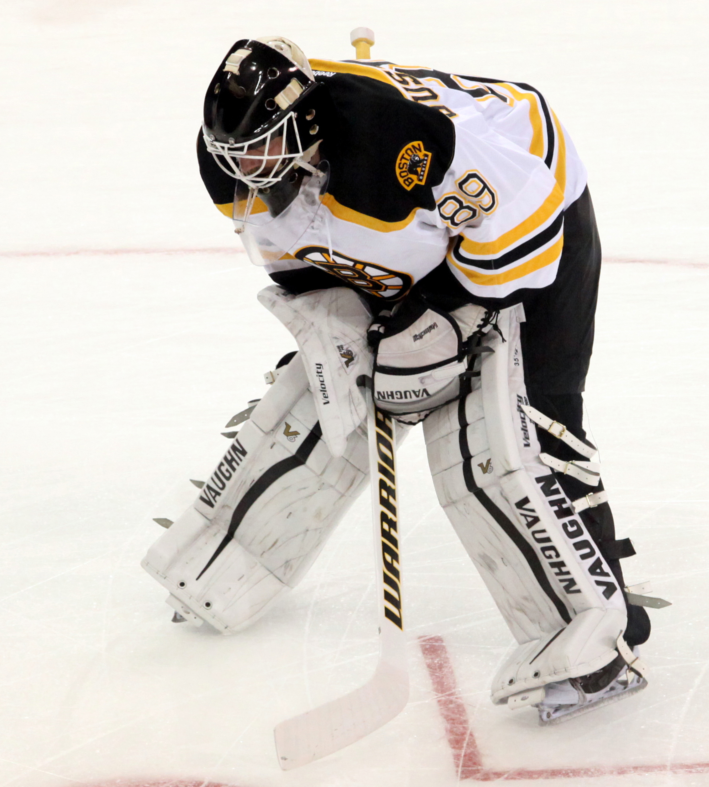 Gustavsson in September 2015.